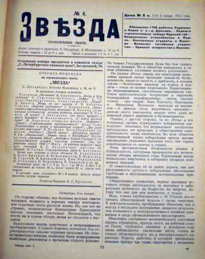 Газета "Звезда". №№1-96, 1910-1912 гг. Выпуск первый №№1-13, 1910-1911 гг. Под ред. М.А.Савельева (1932).